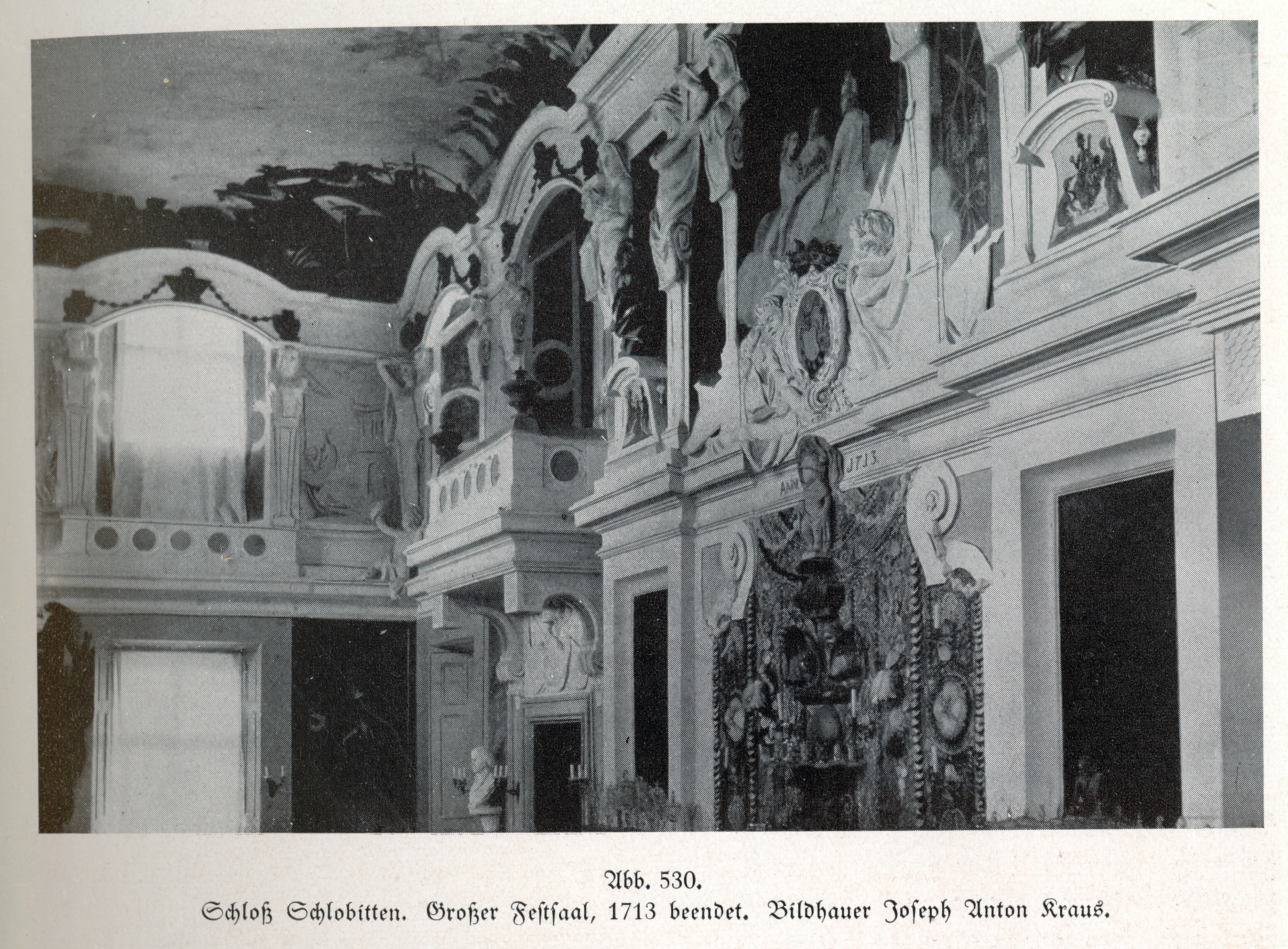 Schloss Schlobitten, Großer Festsaal, 1713, Bildhauer Joseph Anton Kraus